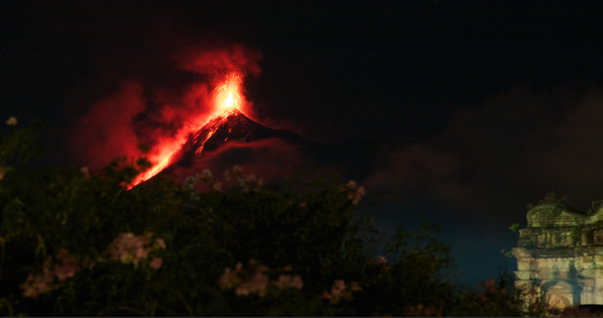 Volcán de Fuego. Ausbruch am 4 Januar 2016. Fotografiert von der Dachterrasse Posada Doña Clara / Antigua (V.K.)